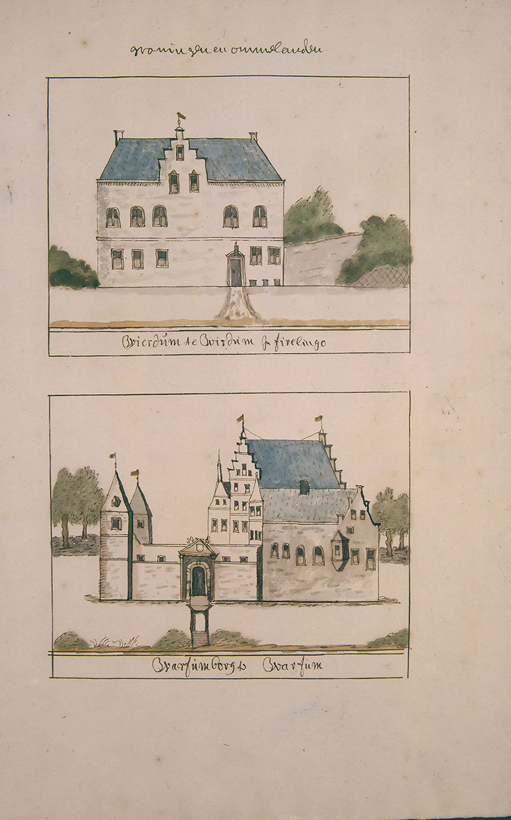 Afbeeldinge en Korte Beschrijving van groningen en ommelanden bij een Versamelt Door Andries Schoemaker